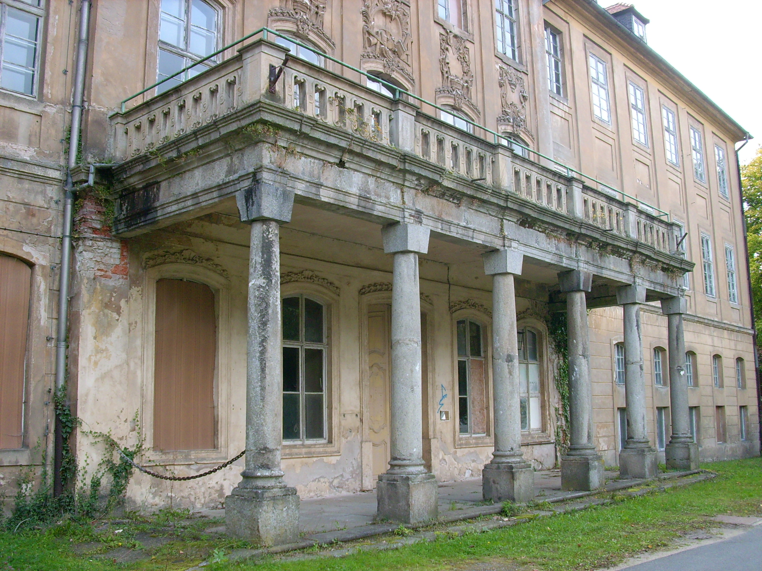 Neues Schloss in Uhyst